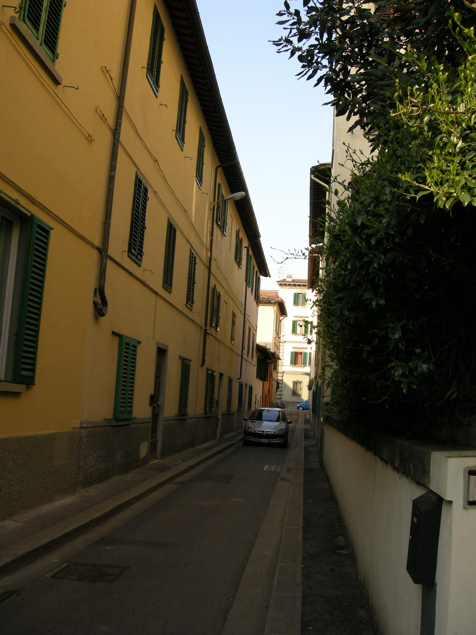 Vicolo del bigozzi, firenze